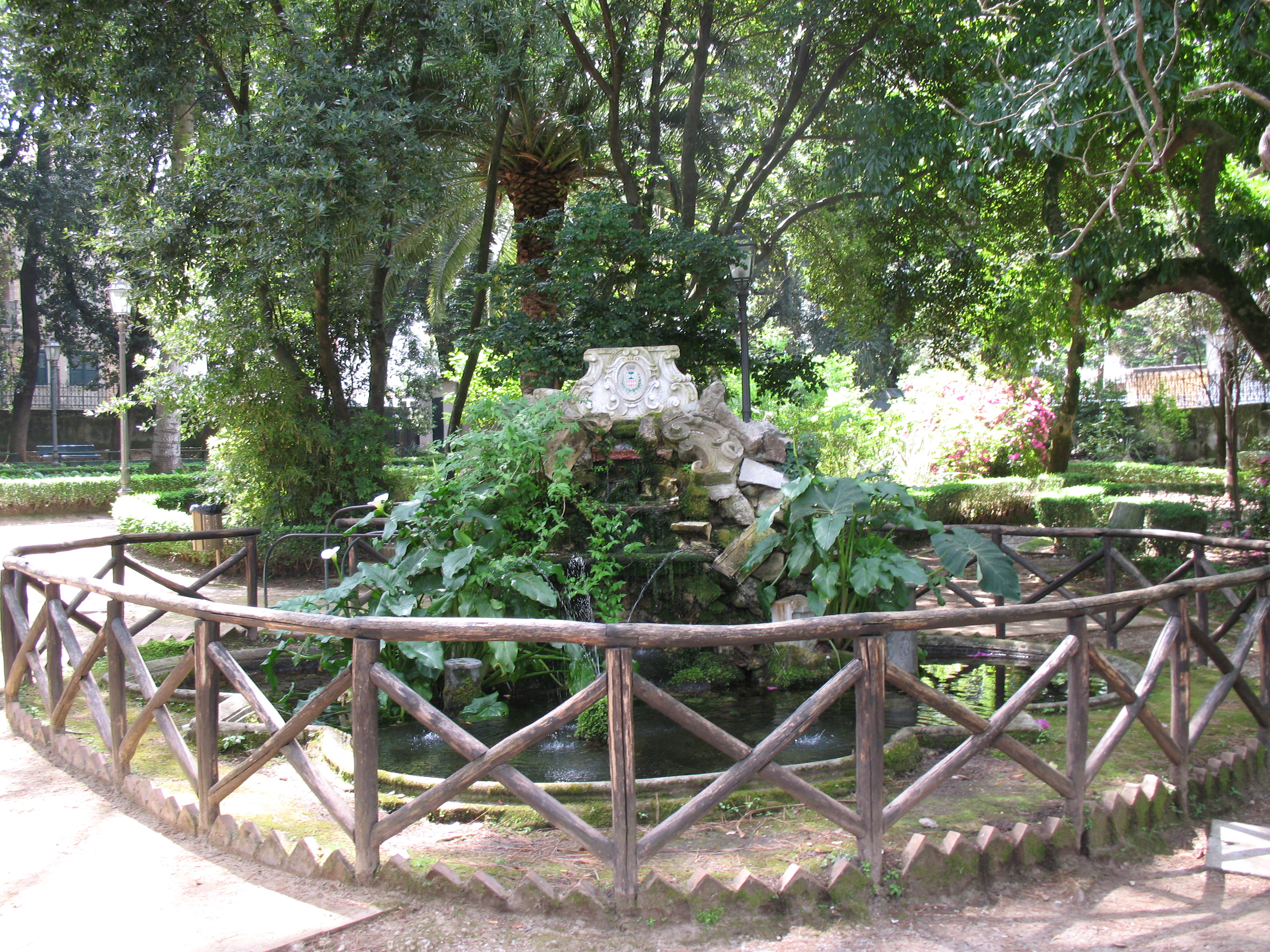 Foto della villa comunale di Cittanova (RC), Italy